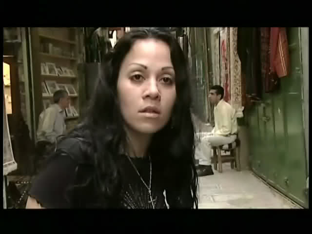 אנה קארינה ארווס בסרט "סינדרום ירושלים" של ויקטור בראון